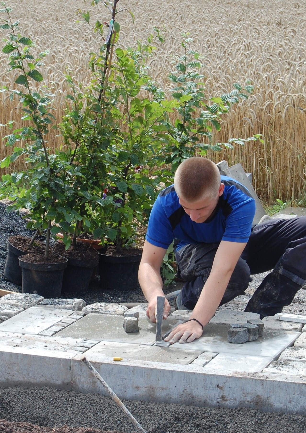 Auszubildender im Garten- und Landschaftsbau bei seiner Prüfungsarbeit